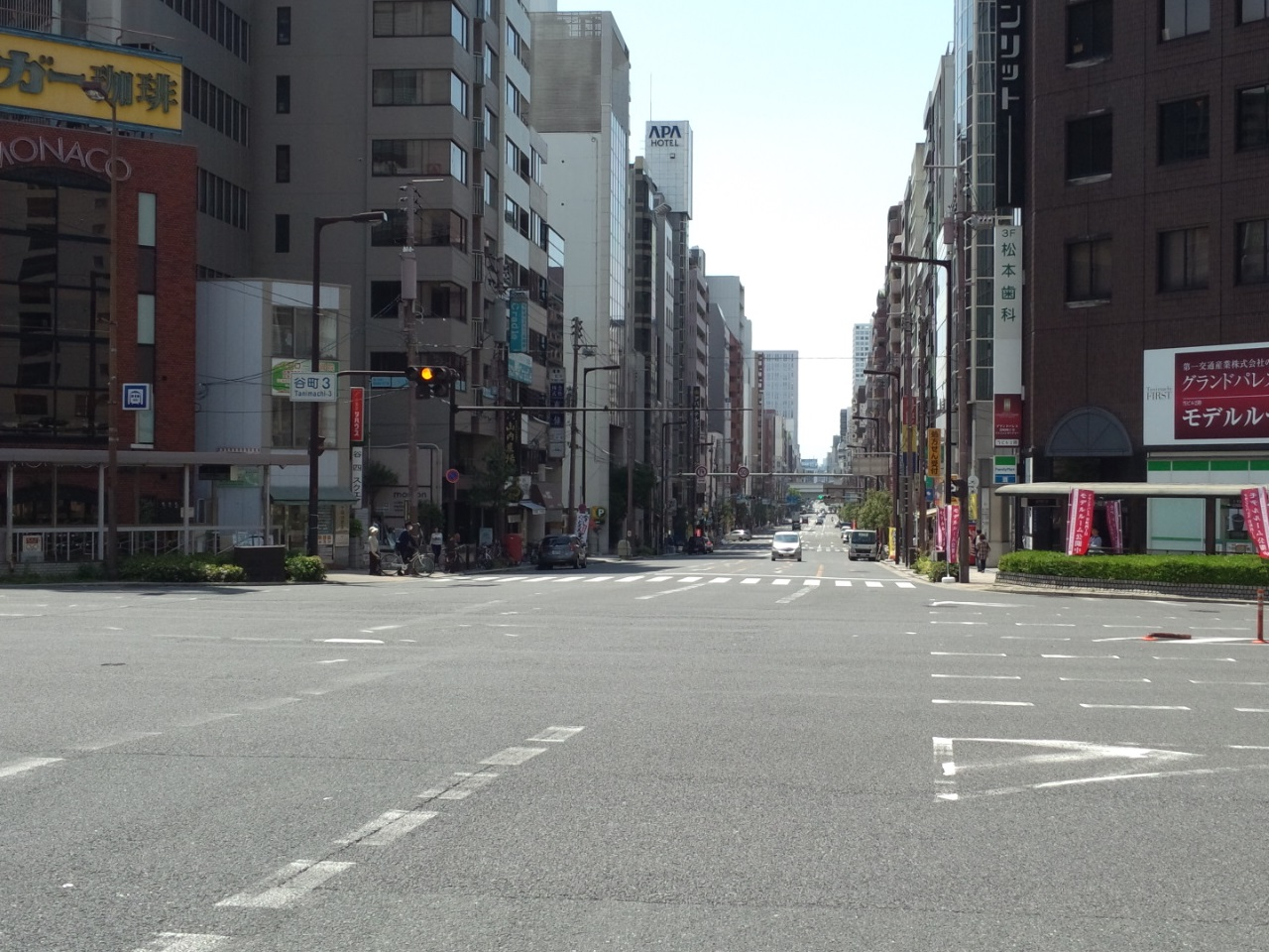 本町通・谷町三交差点